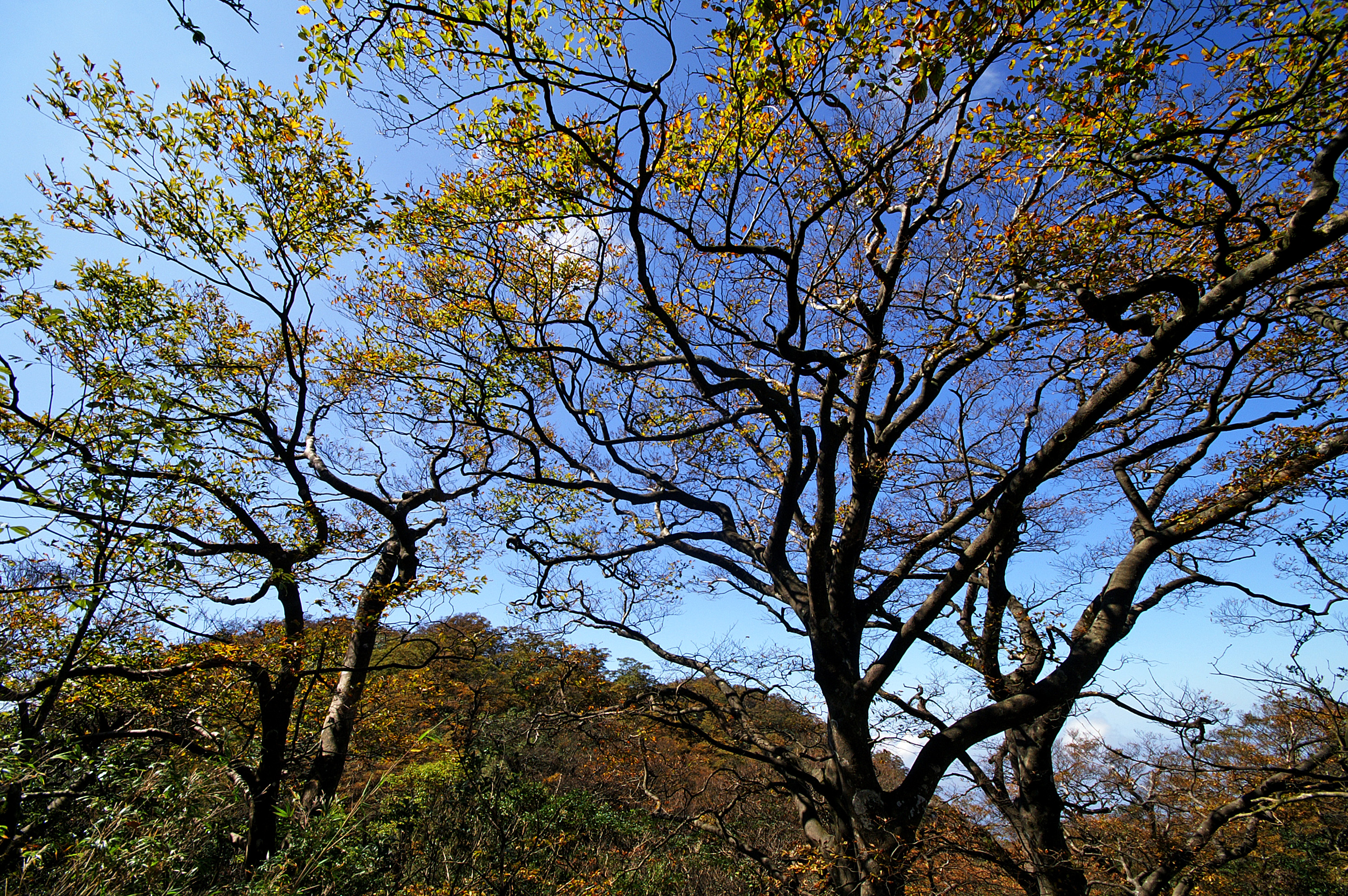 台灣山毛櫸(台灣水青岡),Fagus hayatae